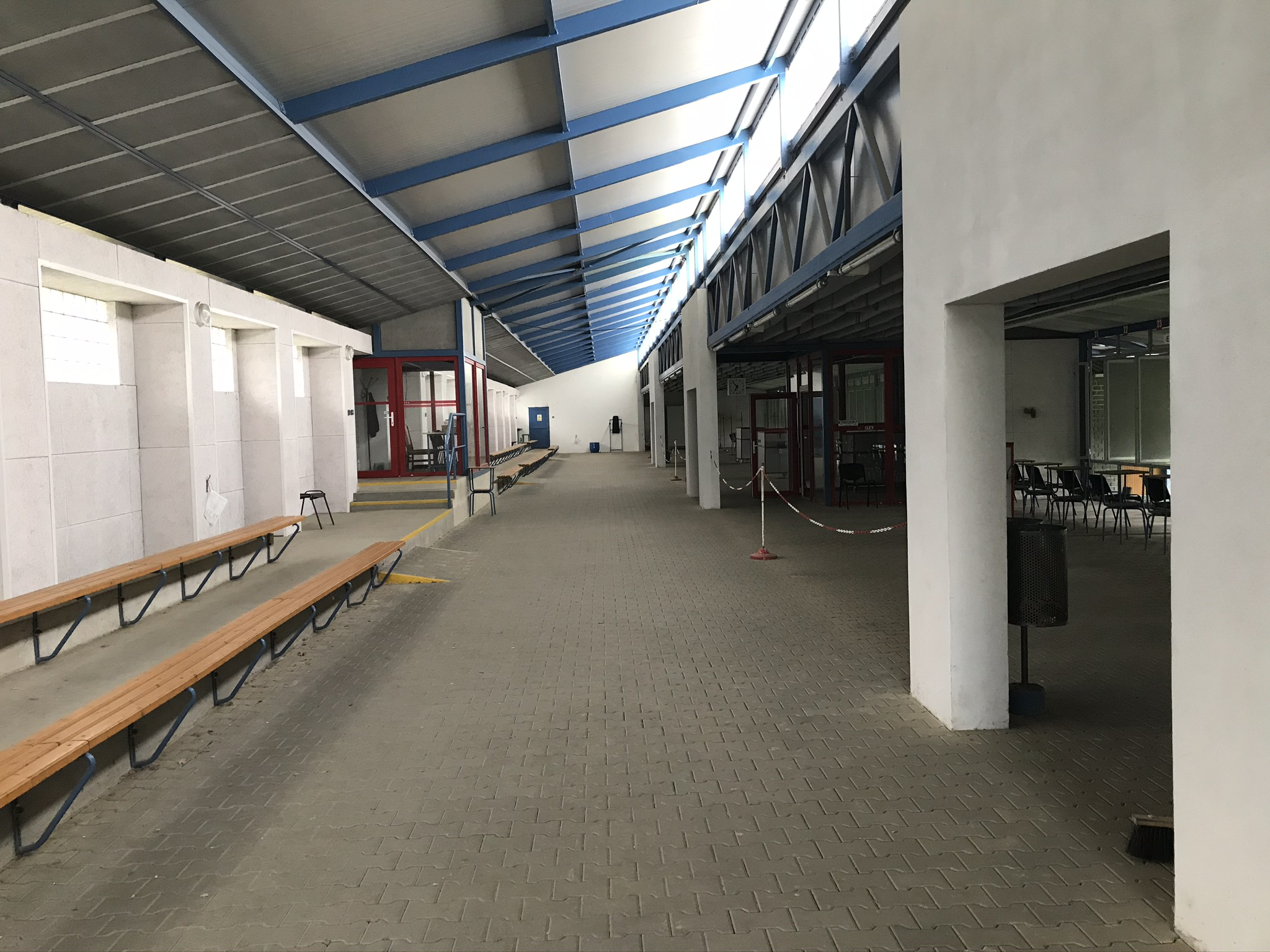 hala 25m střelnice, Armádní střelnice Plzeň